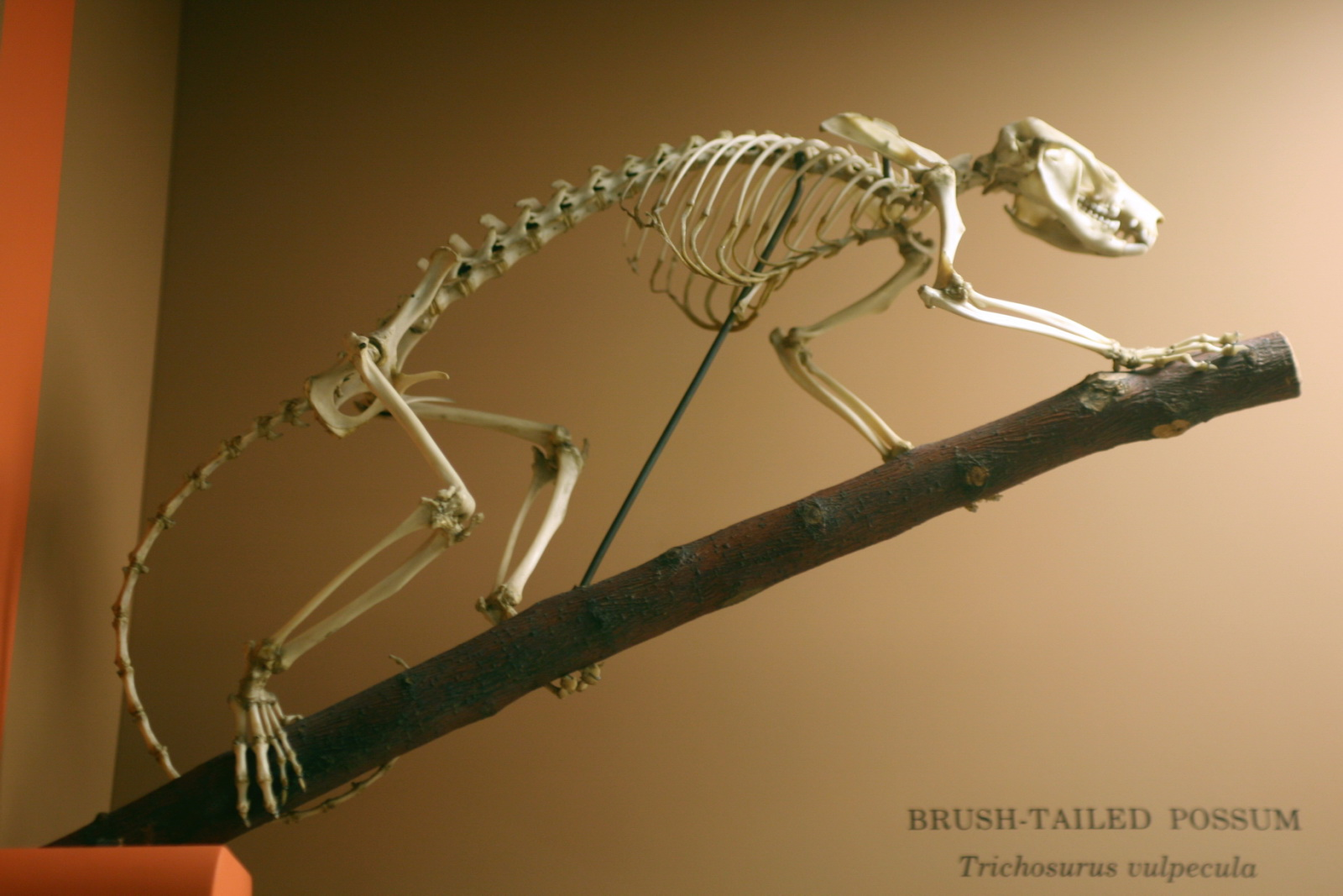 Trichosurus vulpecula skeleton